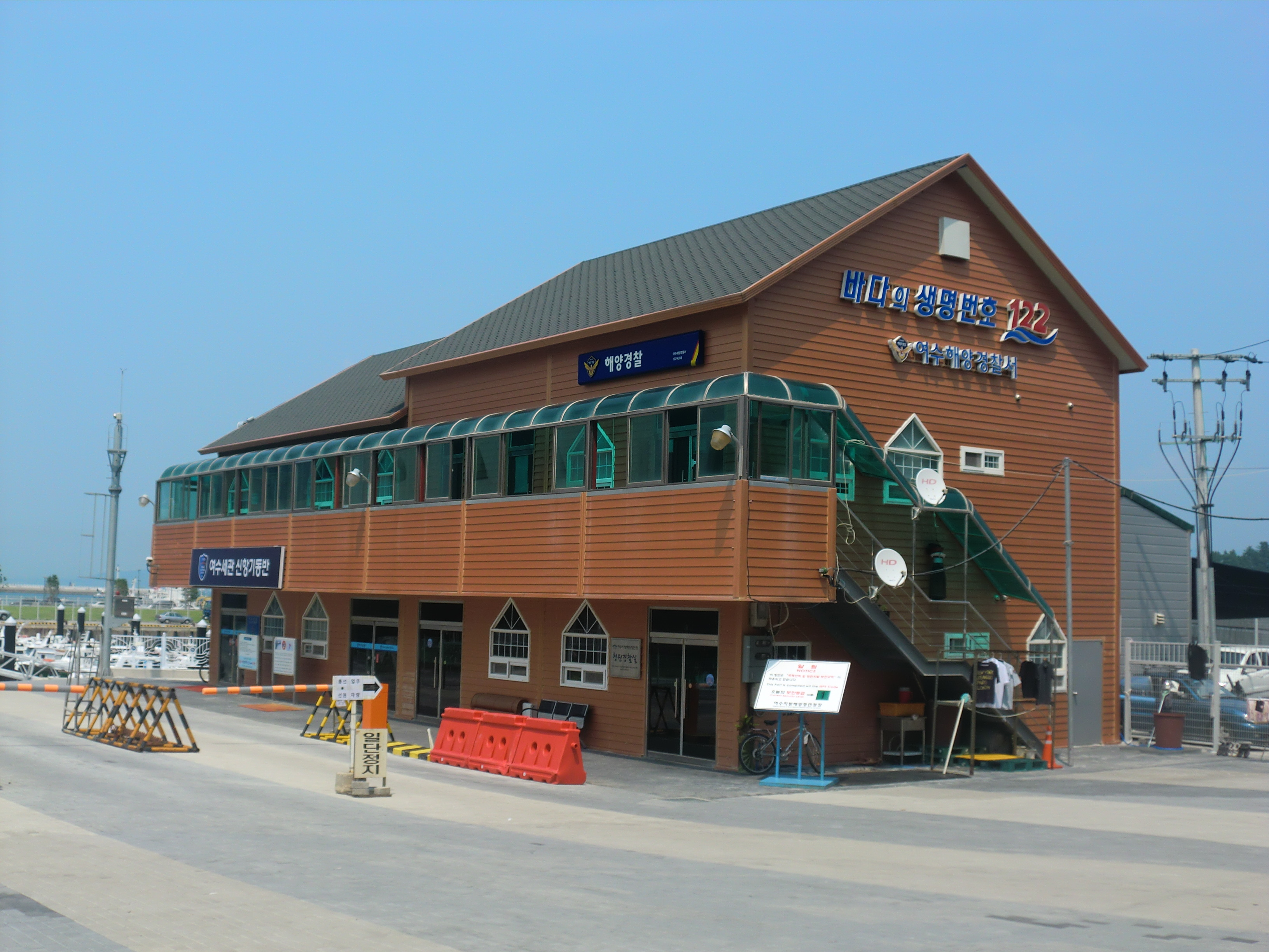 전라남도 여수시에 있는 여수해양경찰서122구조대, 여수세관시항감시초소